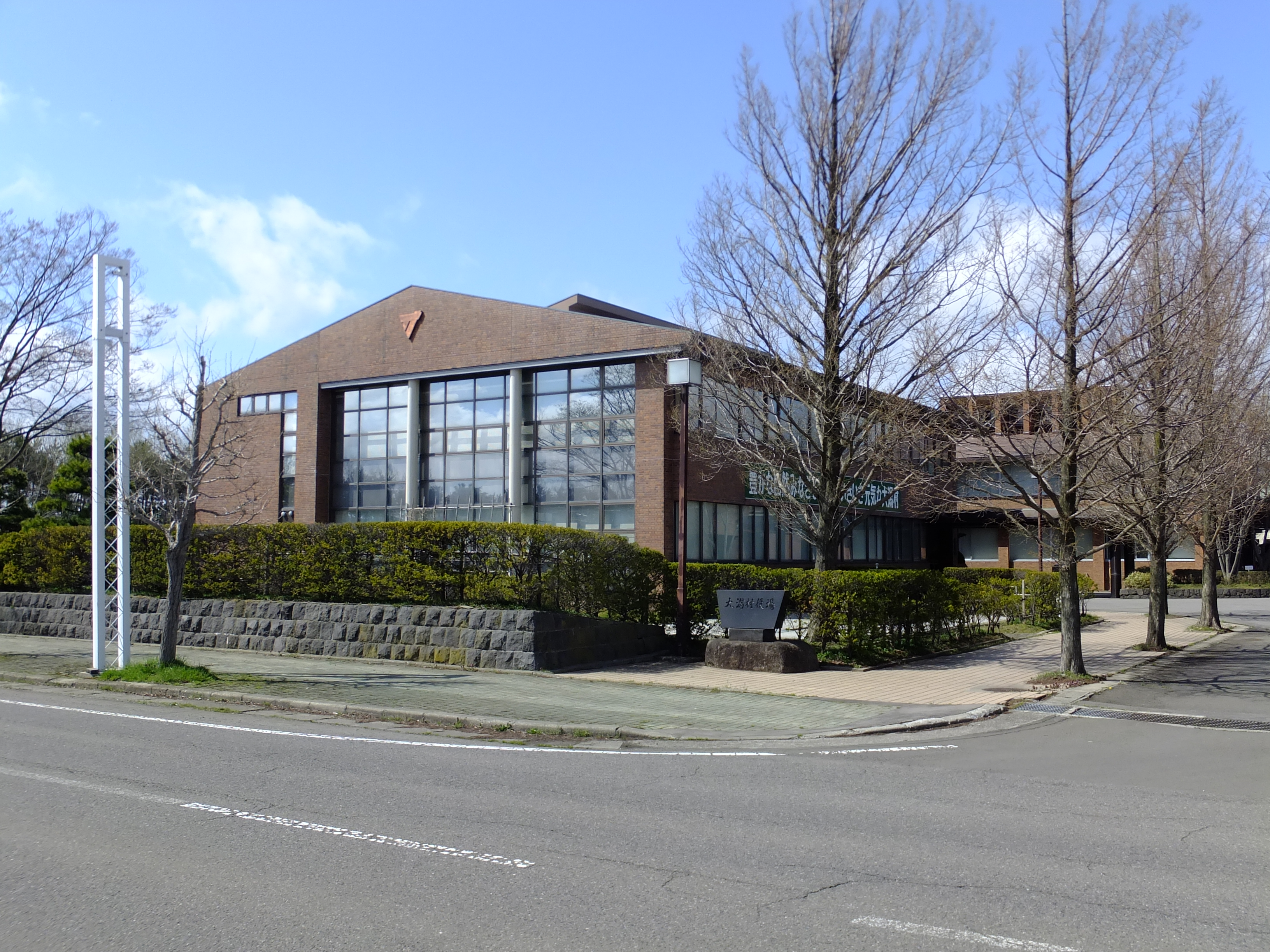 大潟村役場